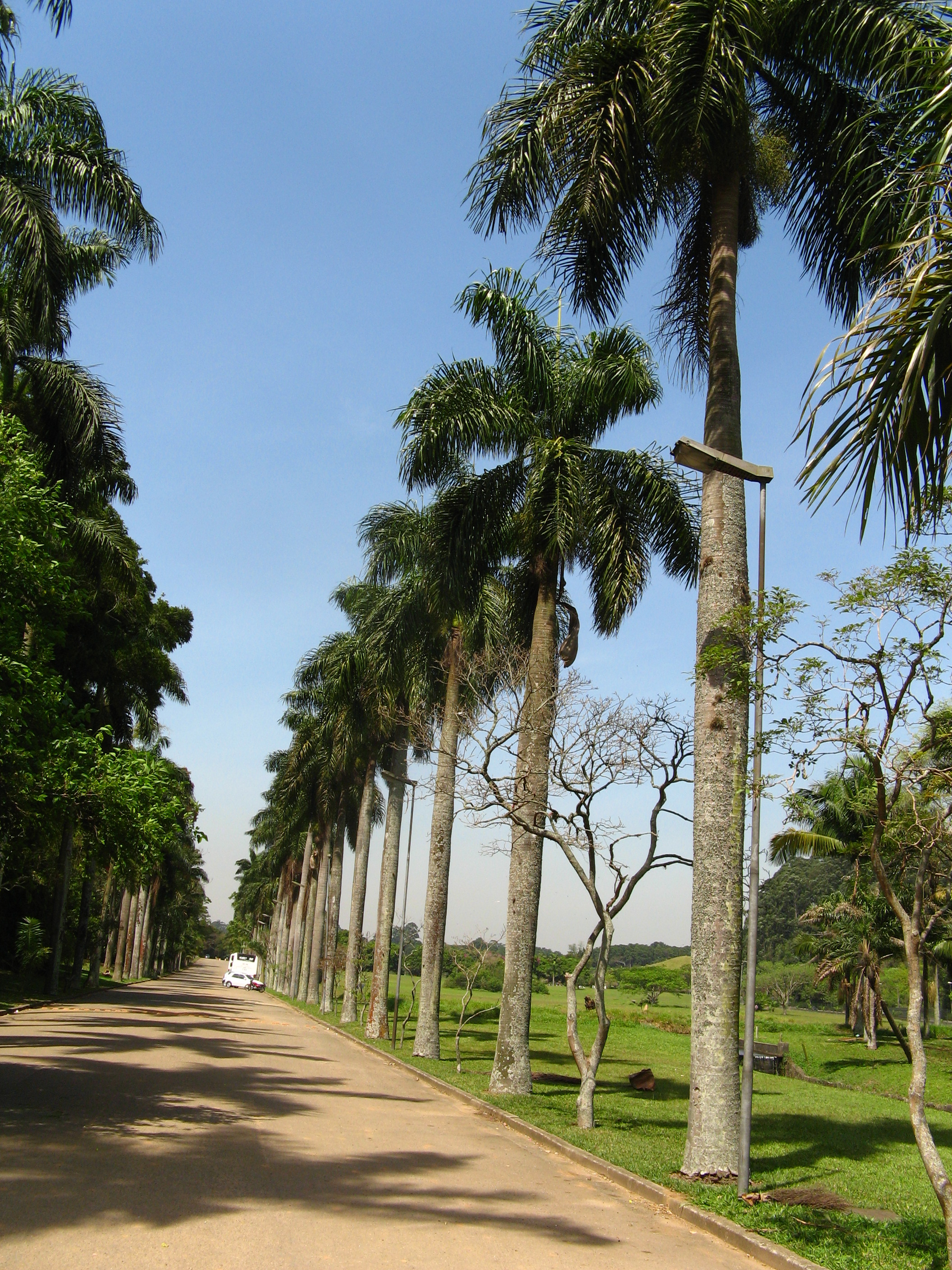 Roystonea borinquena, Sao Paolo, Brazil